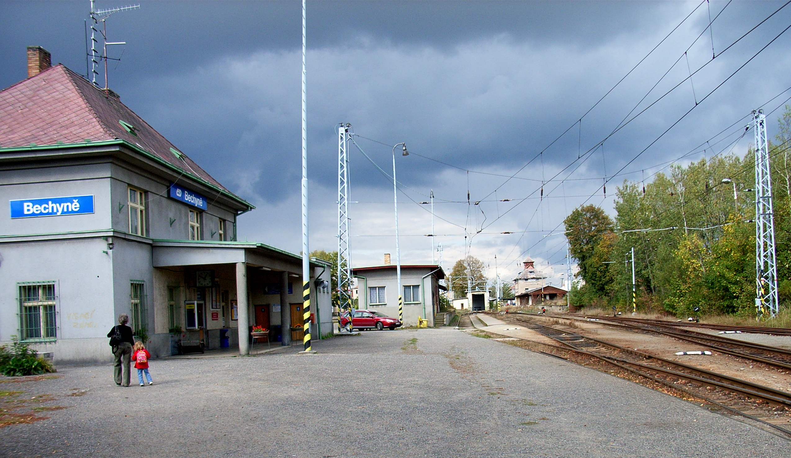 Česky: Nádraží elektrické dráhy v Bechyni